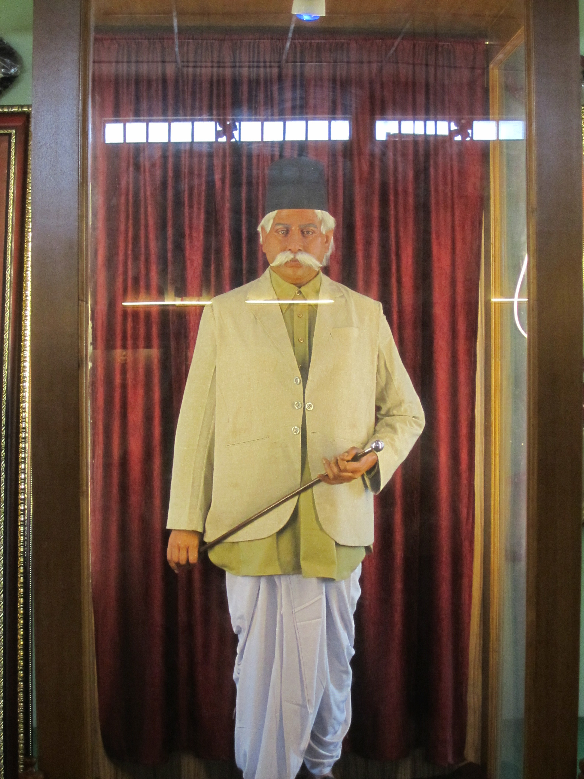 Dr. Keshav Baliram Hedgewar figure at the main office in nagpur